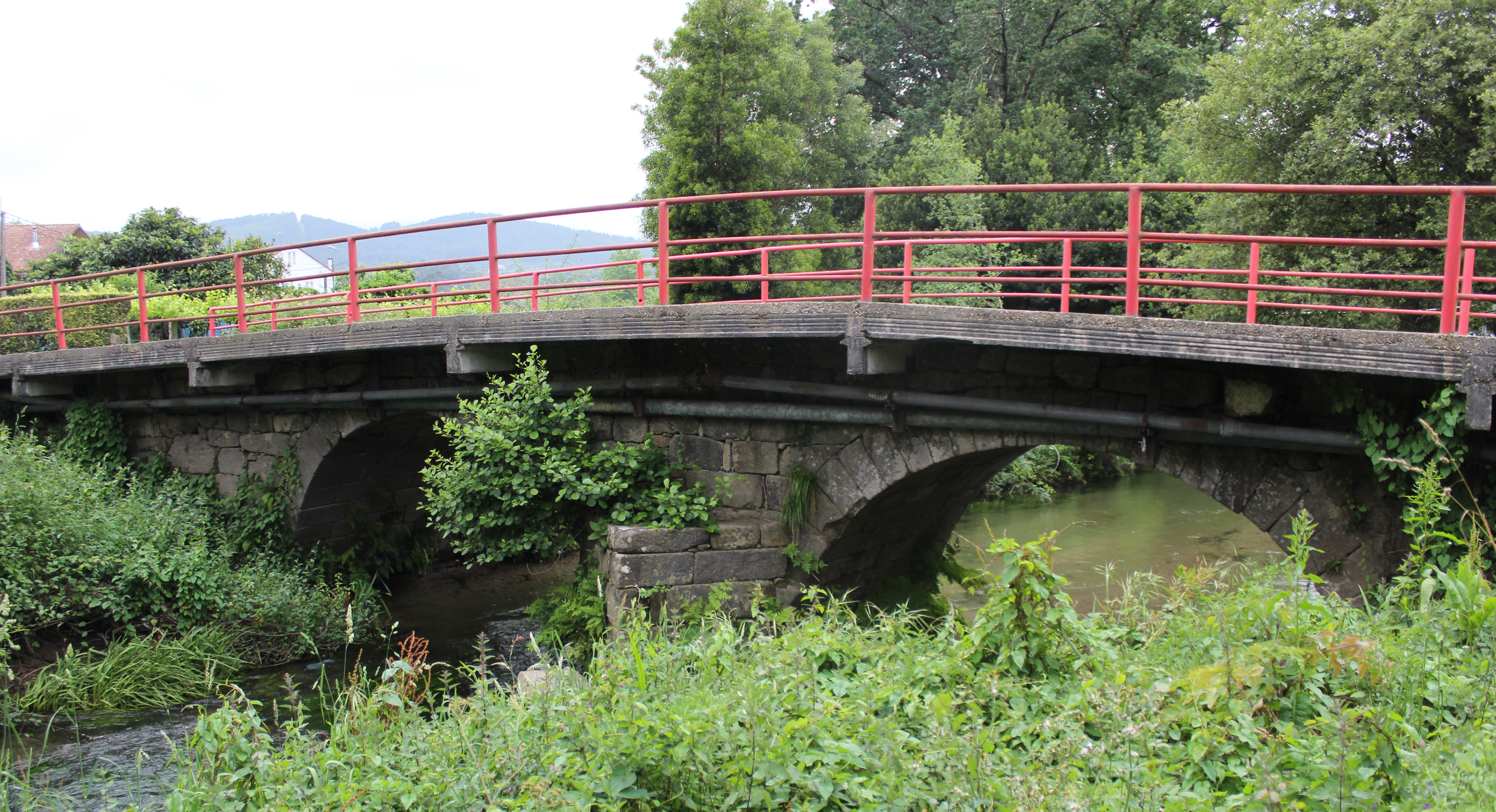 Núcleo urbano da Ponte